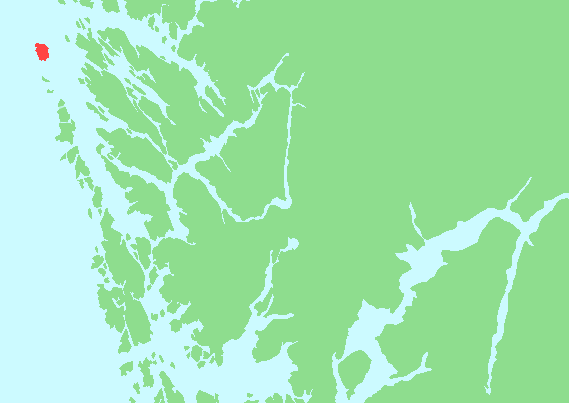 The island Fedje in Fedje municipality i Norway.